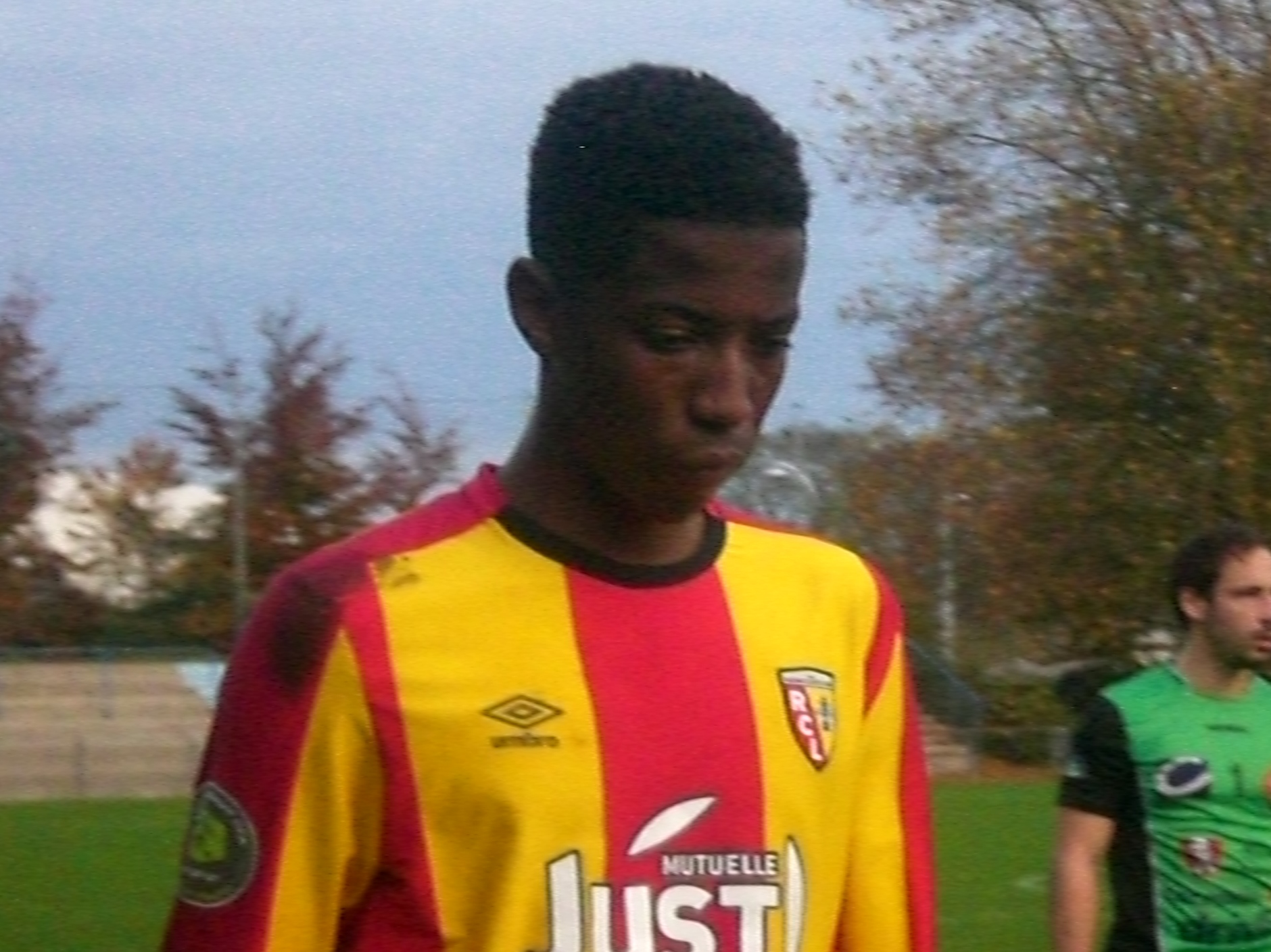 Simon Banza après le match RC Lens B / ES Wasquehal, comptant pour la dixième journée du Championnat de France de football amateur (CFA), le 8 novembre 2015, au Stade François Blin d'Avion.